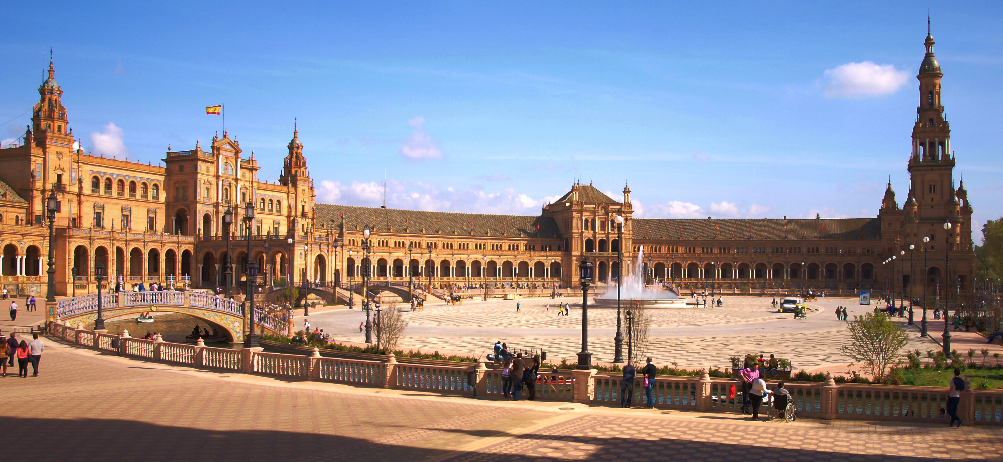 Plaza de España (Sevilla). 37°22′39″N 5°59′9″O.